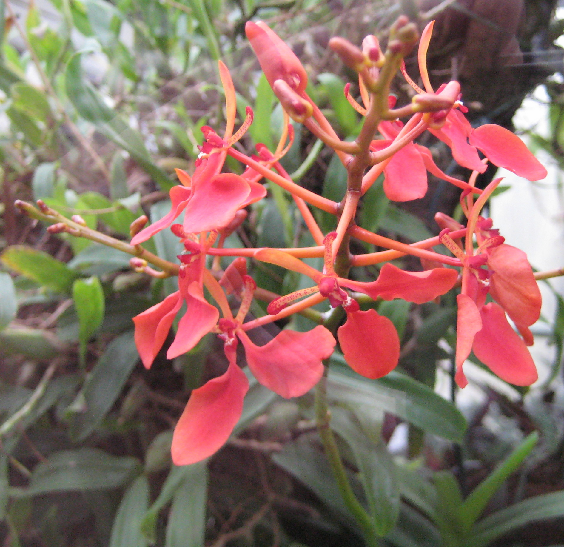 Renanthera imschootiana im Botanischen Garten Dresden